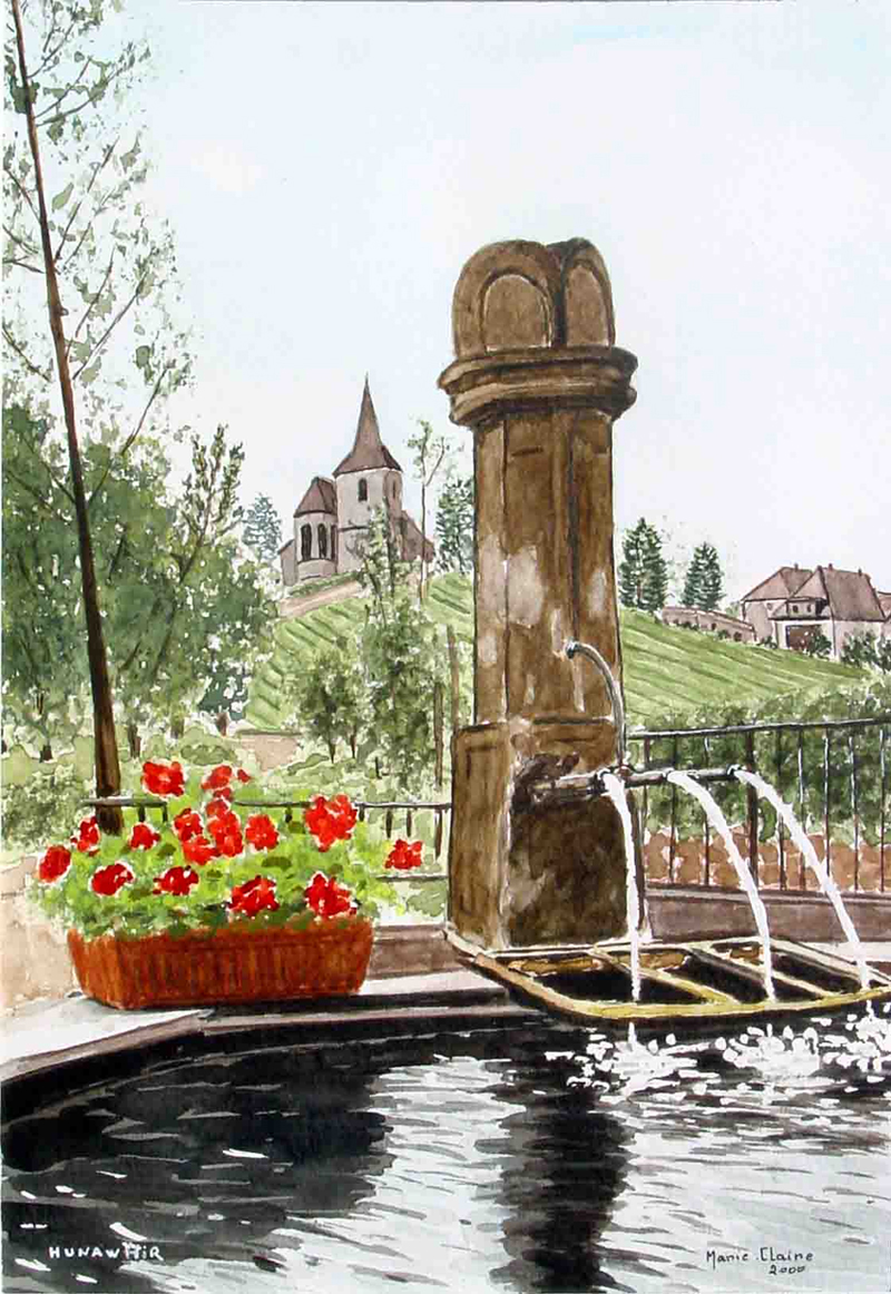 Hunawihr, la fontaine du vignoble.